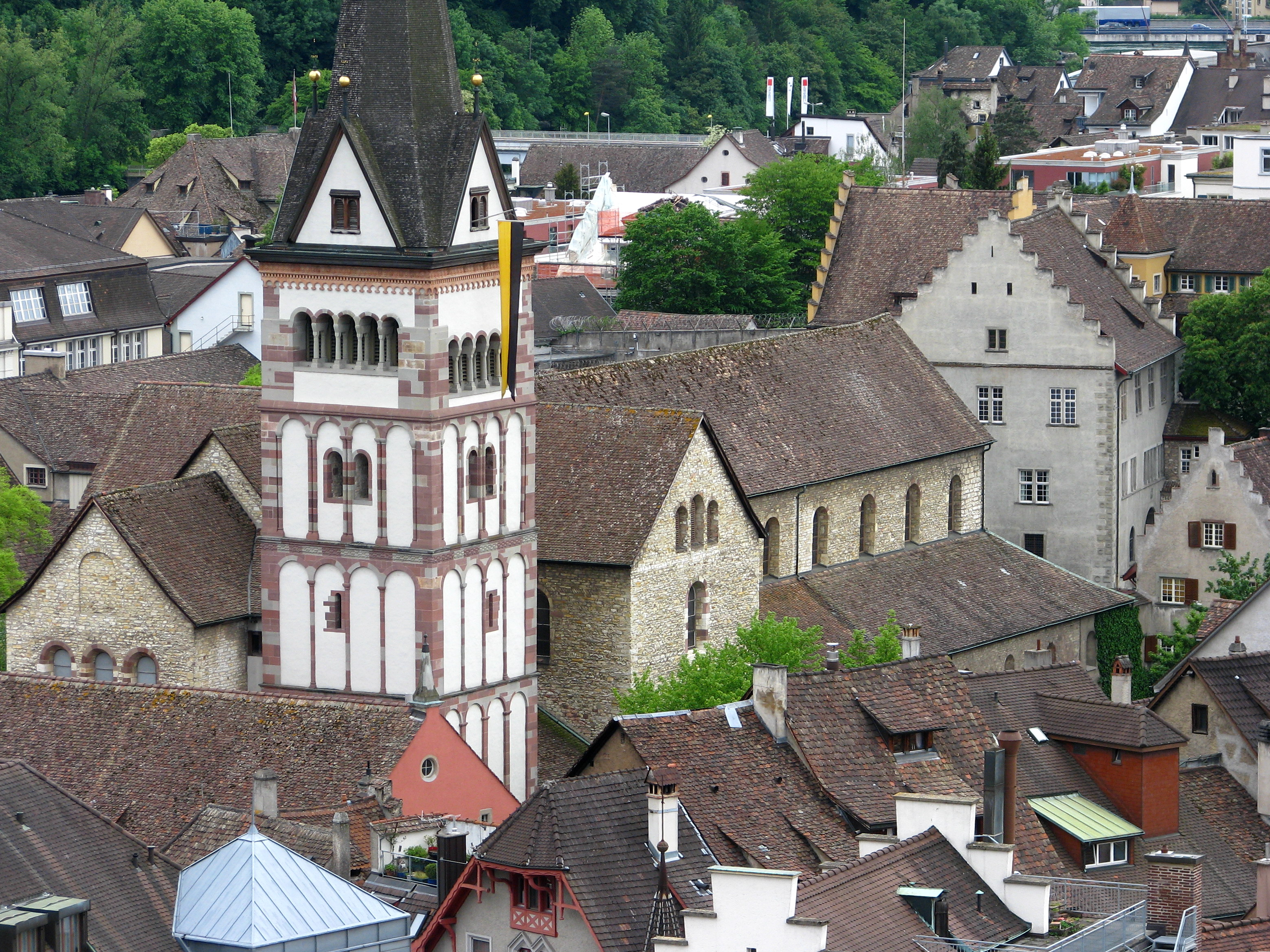 Kloster Allerheiligen in Schaffhausen as seen from Munot